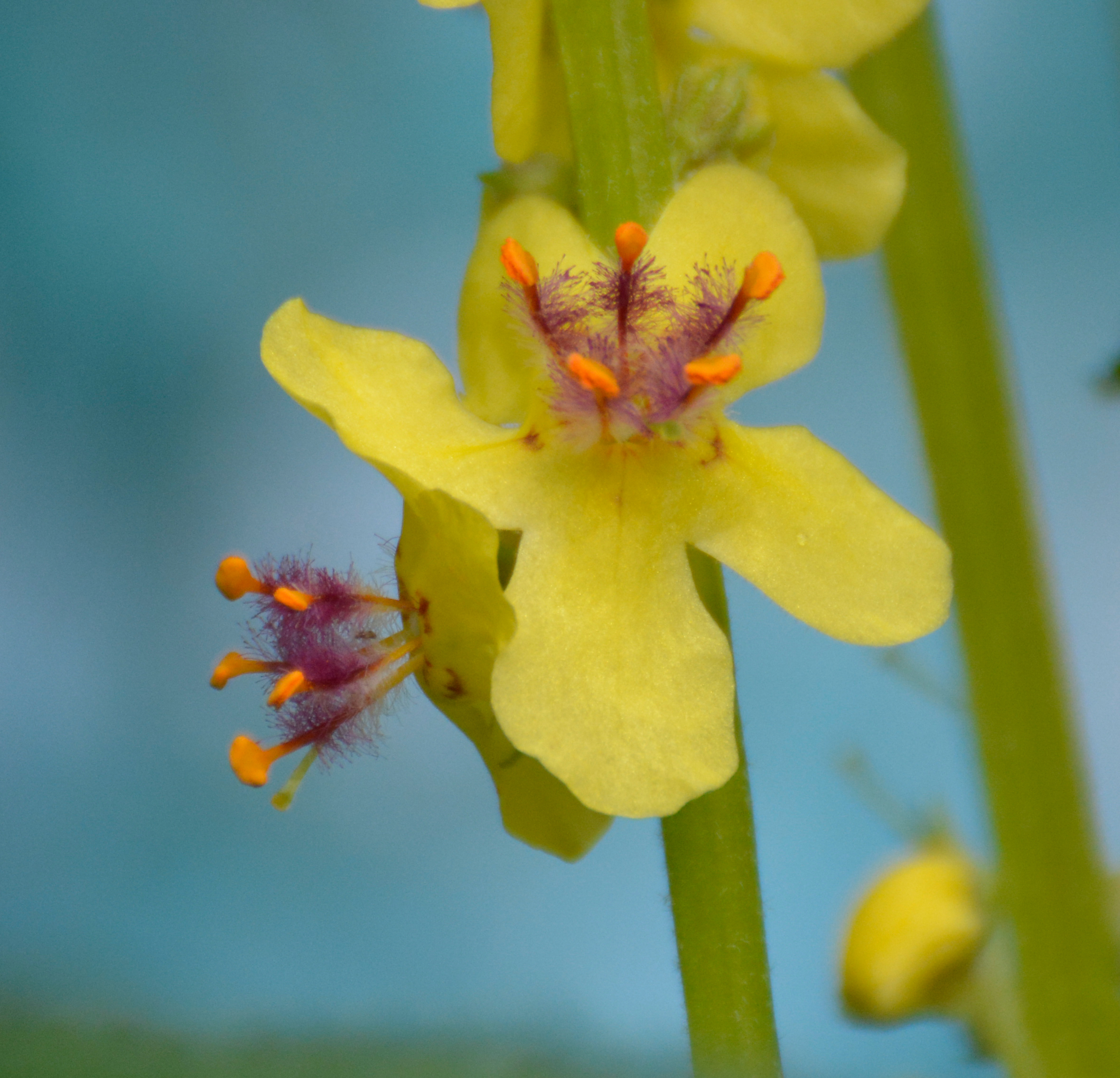 Musta vägiheina õied.